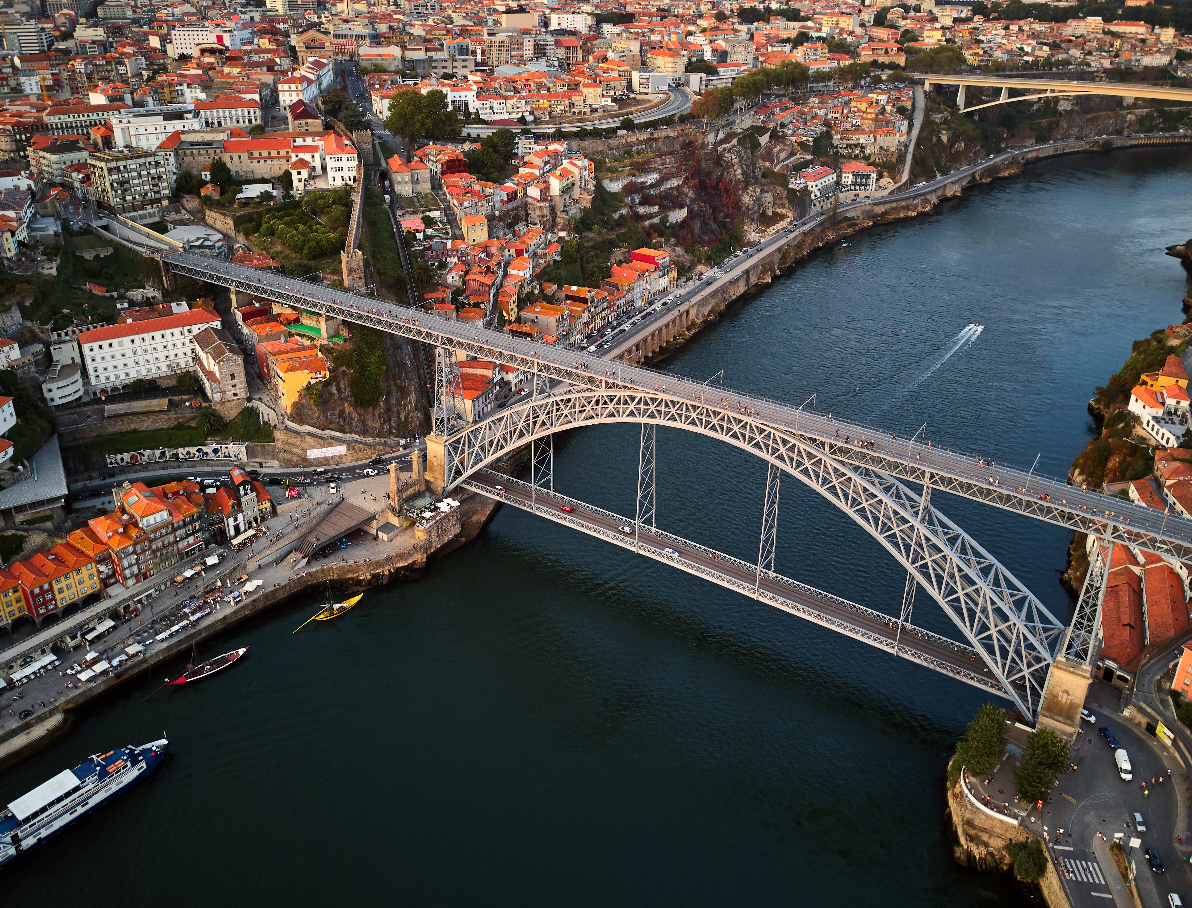 Dom Luís I Bridge